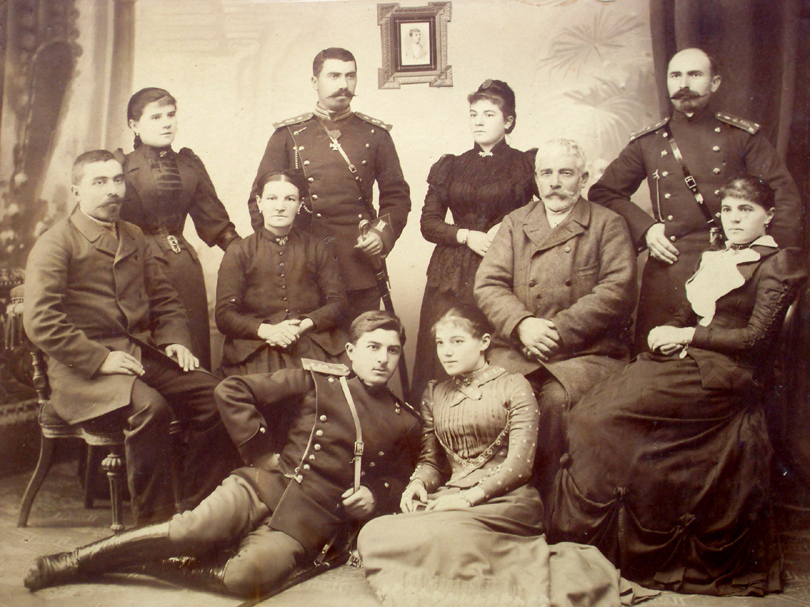 Иван Вълчанов Иванов със семейството си